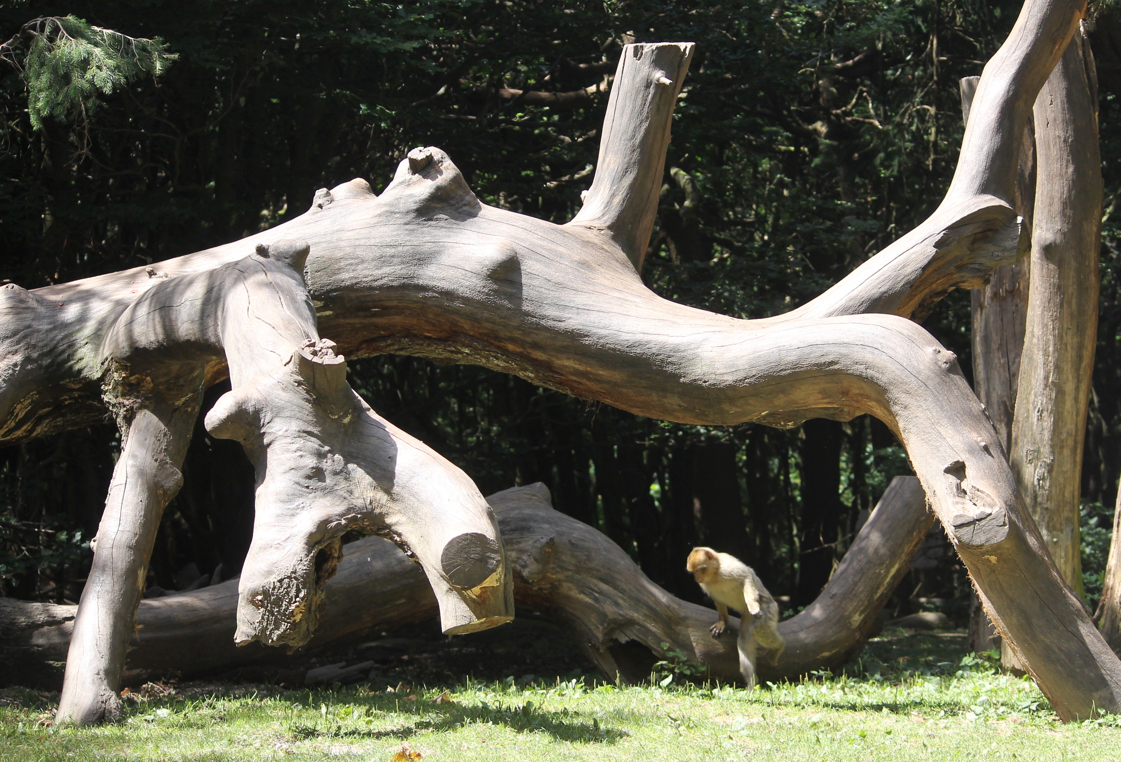 La Montagne des Singes, Kintzheim (2016)